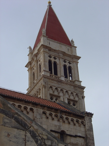 Zvonik Sv. Lovre u Trogiru , snimljeno 2005. Ova slike je stavljena kao javno dobro pri uporabi van wikipedije potrebno je spomenuti ime autora slike : Karlo ?iljeg